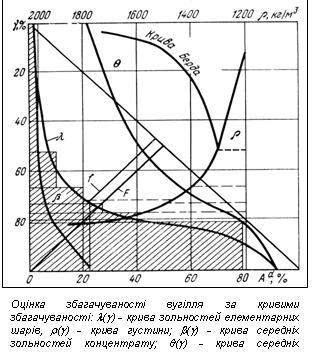 Схема